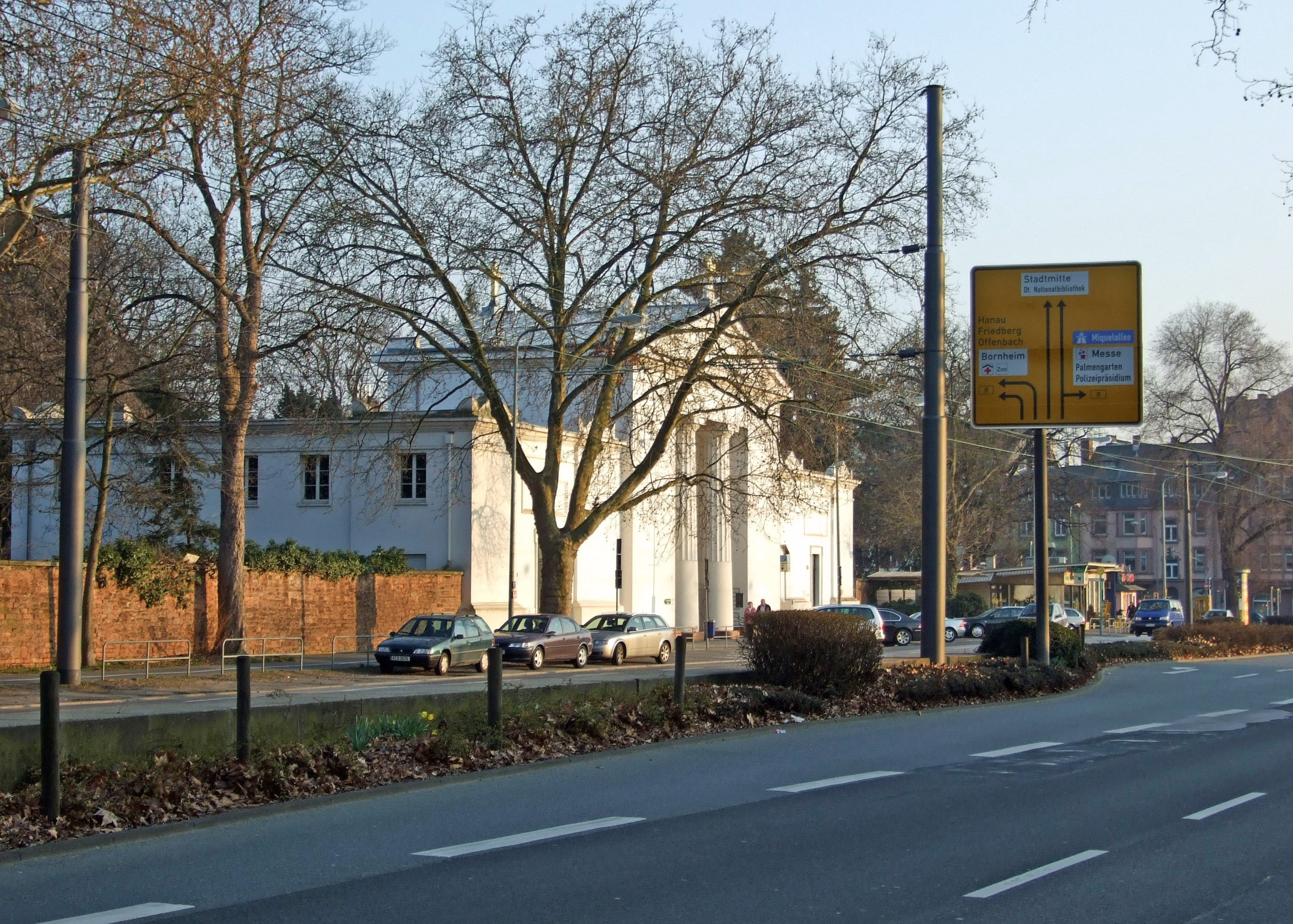 Altes Portal des Frankfurter Hauptfriedhofes an der Eckenheimer Landstrasse